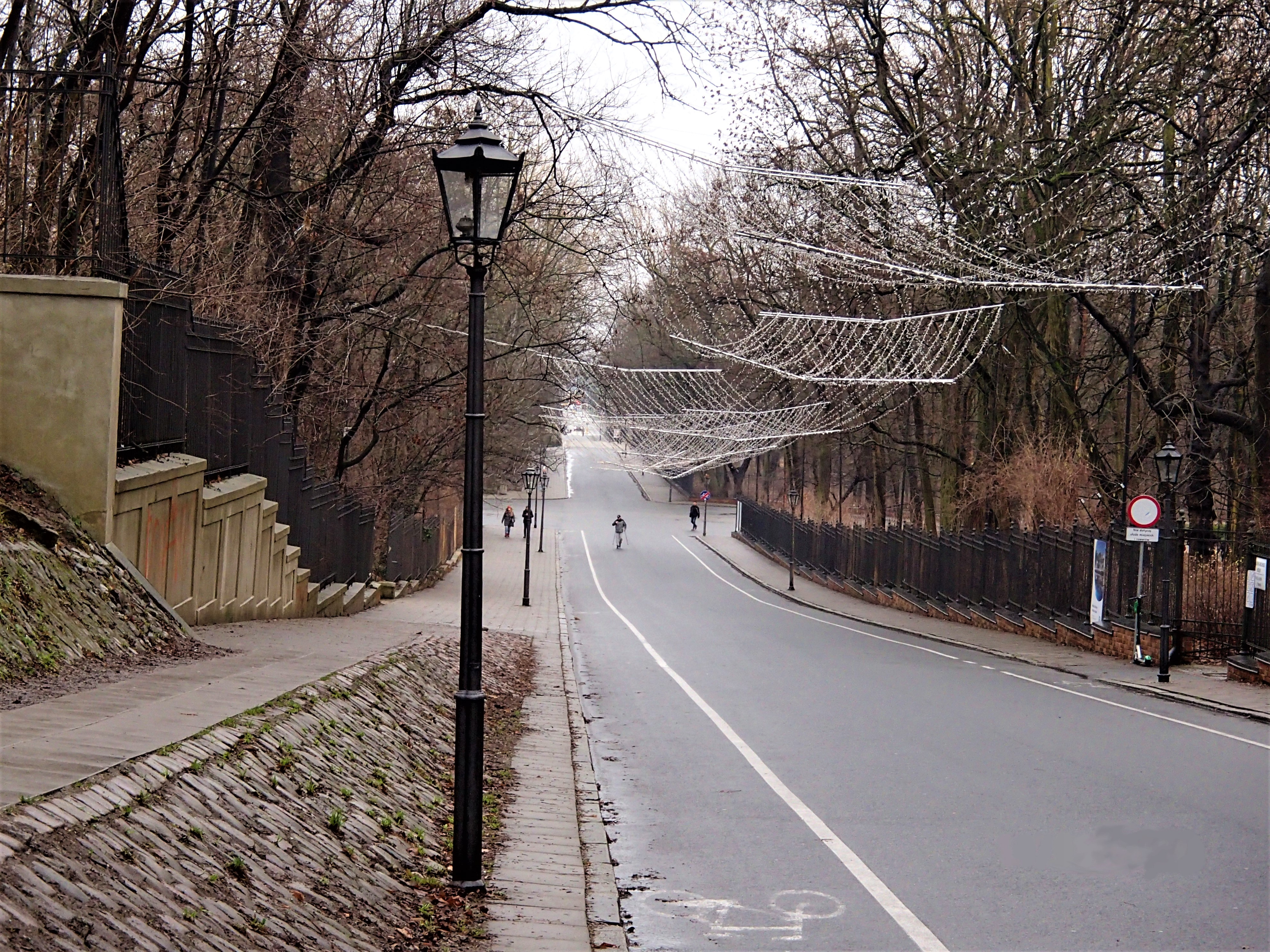 Latarnie gazowe widziane od strony placu Alei Ujazdowskich